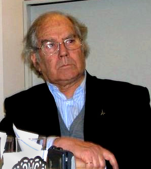 Adolfo Pérez Esquivel en una reunión llevada a cabo el 10 de agosto de 2011 en el colegio de Abogados de Morón.